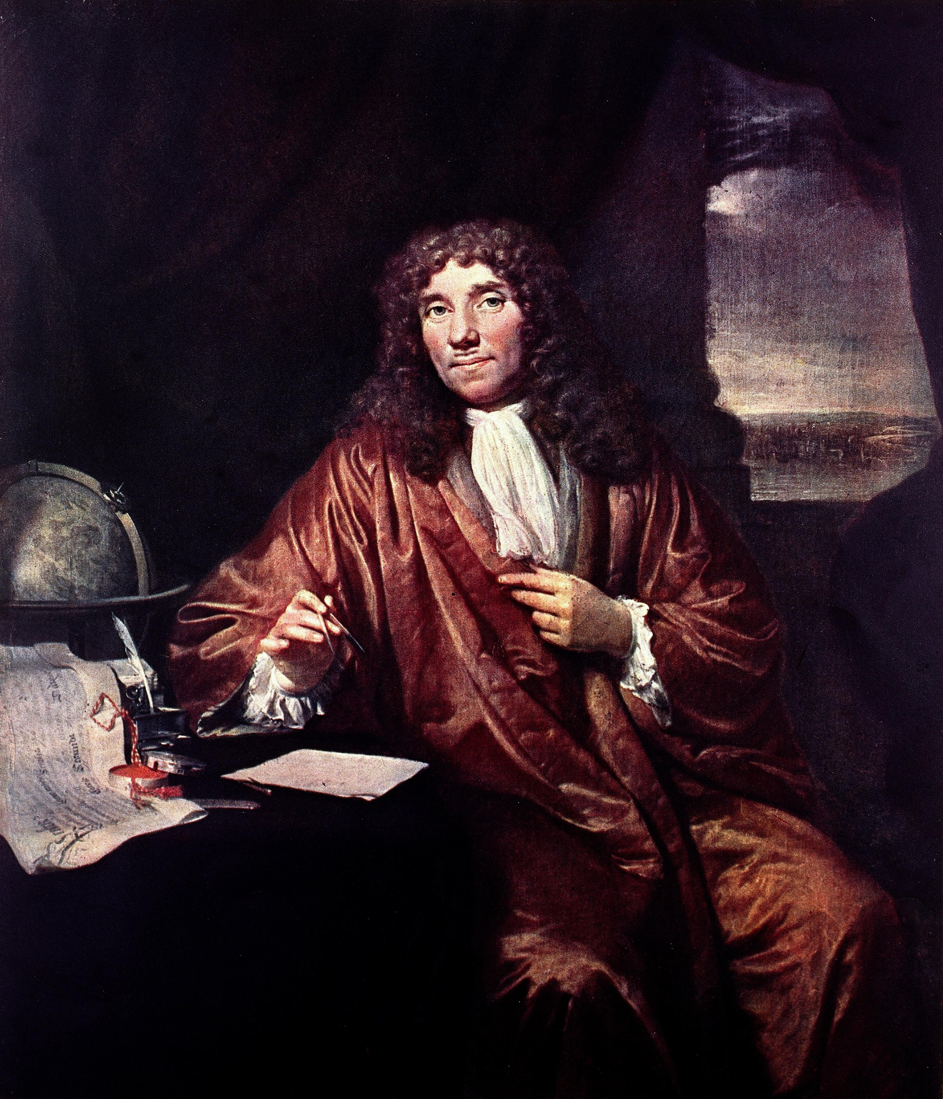 Portrait of A.V. Leeuwenhoek. Iconographic Collections Keywords: Leeuwenhoek, Anthony van; J. Verolje